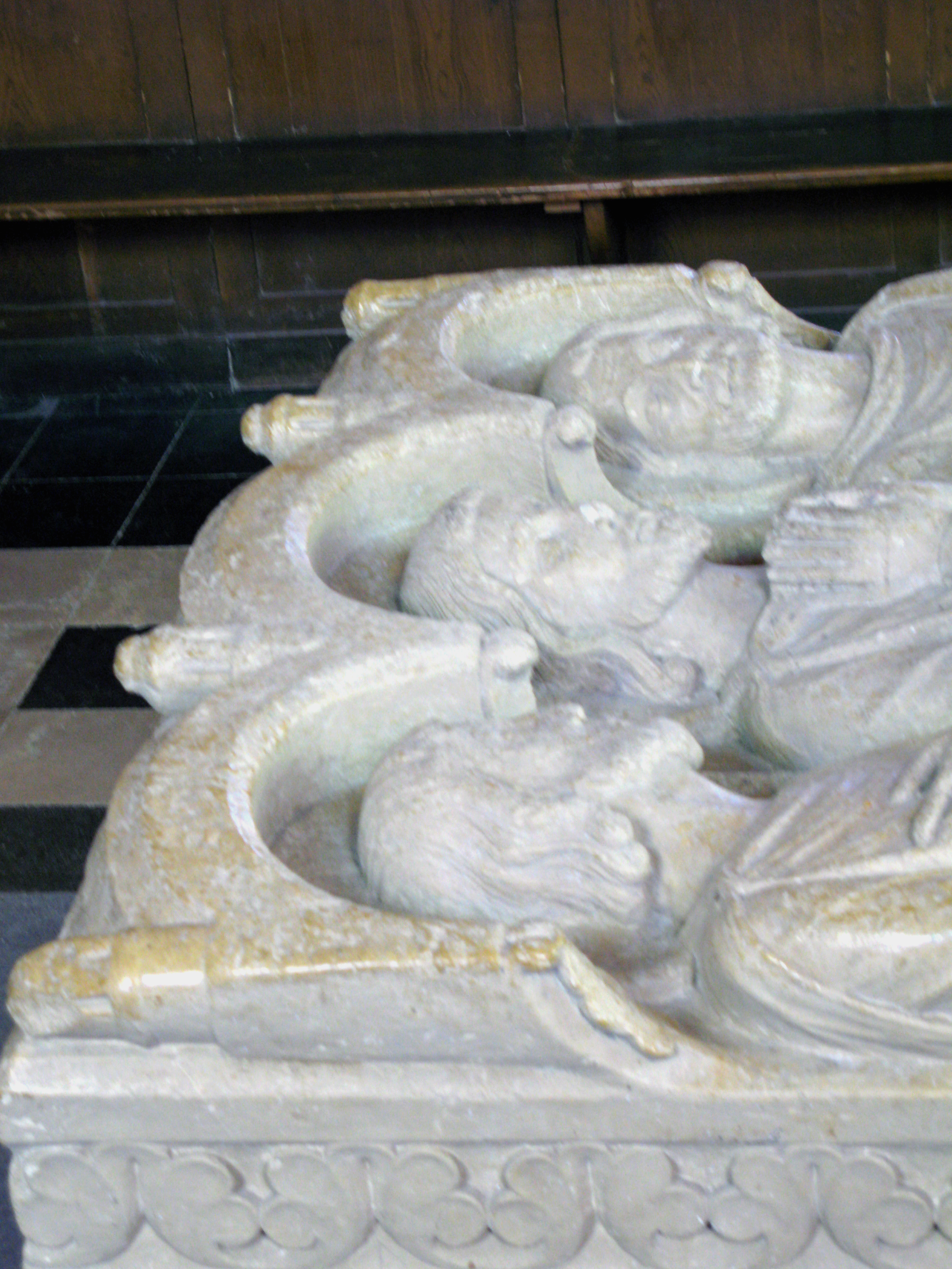 Sains-en-Amiénois (Somme, France) - Détail de la dalle du tombeau des 3 saints, visible dans le choeur de l'église. On remarque le lustrage, la patine de la pierre (couleur différente) aux endroits plus facilement accessibles aux mains des fidèles.